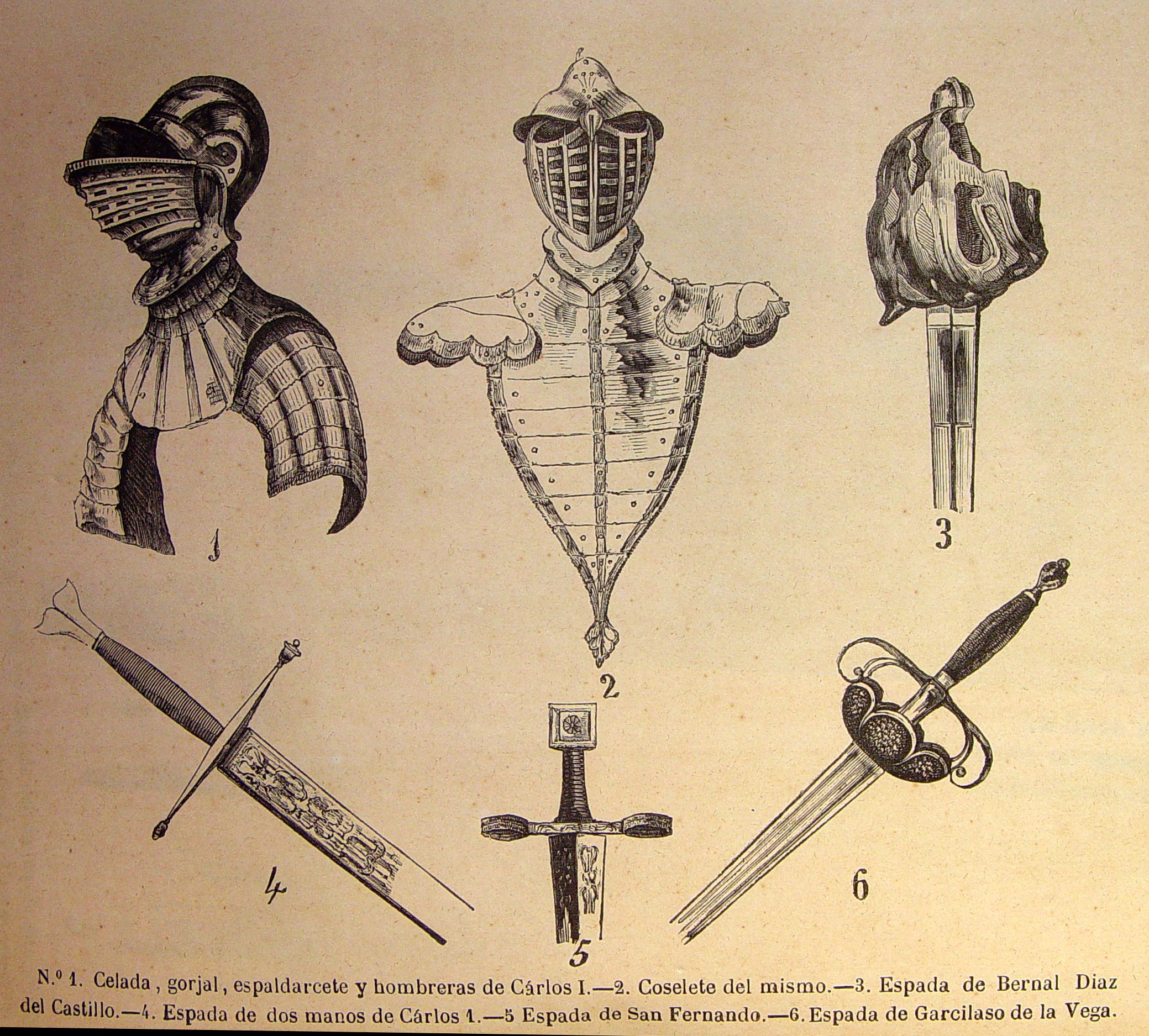 "1. Celada, gorjal, espaldarcete y hombreras de Carlos I 2. Coselete del mismo 3. Espada de Bernal Díaz del Castillo 4. Espada de dos manos de Carlos I 5. Espada de San Fernando 6. Espada de Garcilaso de la Vega. Se conservan en la Real Armería de Madrid". Ilustraciones pertenecientes al libro: Las glorias nacionales : grande historia universal de todos los reinos, provincias, islas y colonias de la Monarquía Española, desde los tiempos primitivos hasta el año de 1852. - Madrid [etc.] (Barcelona : Imprenta de Luis Tasso) Librería de la Publicidad [etc.], 1852-1854.